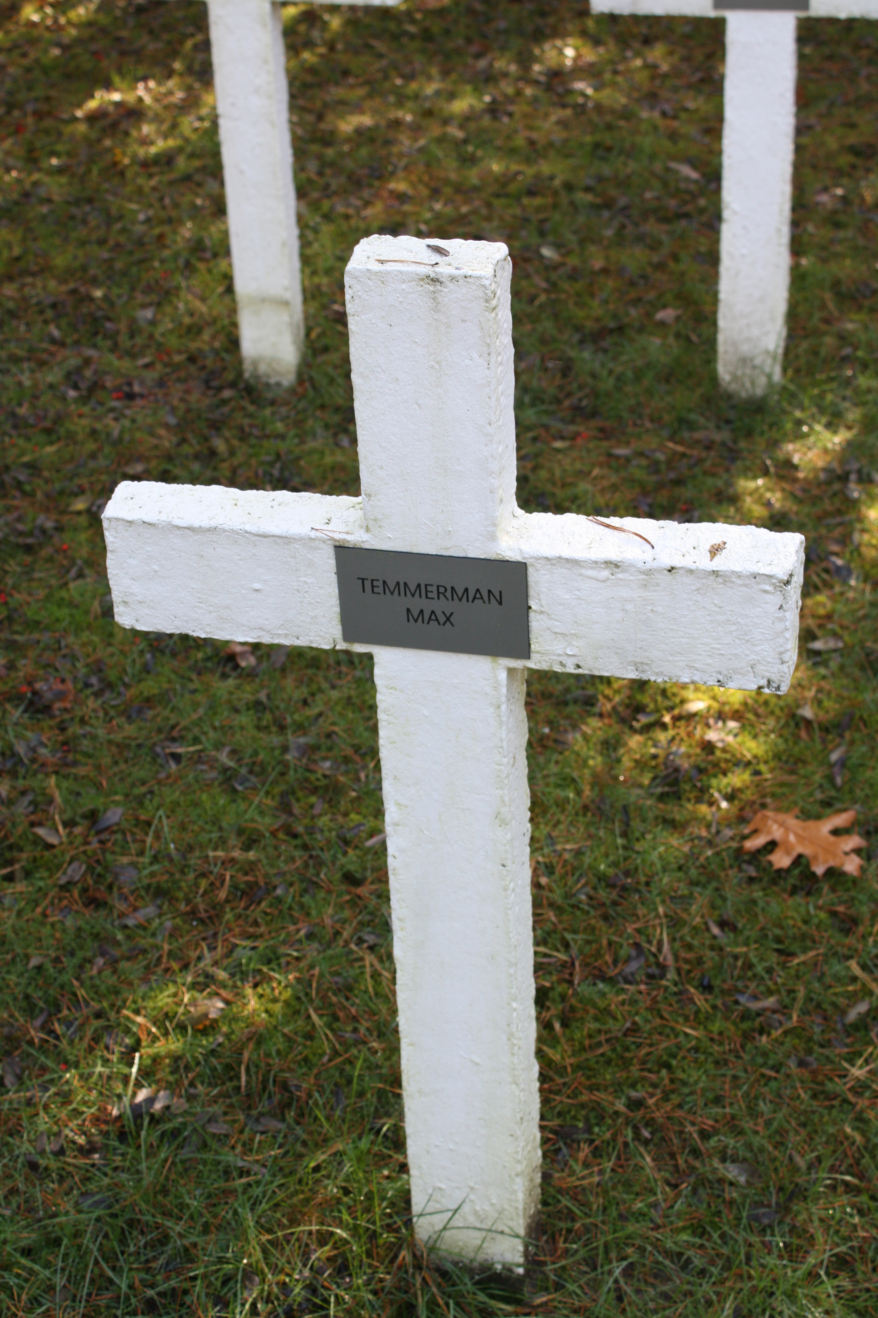 Geheime begraafplaats in Hechtel bij Leopoldsburg Monument aan de heldhaftige Weerstand